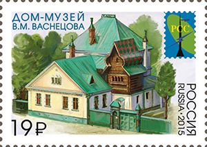 Совместный выпуск Администраций связи стран – членов РСС. Памятники архитектуры столиц